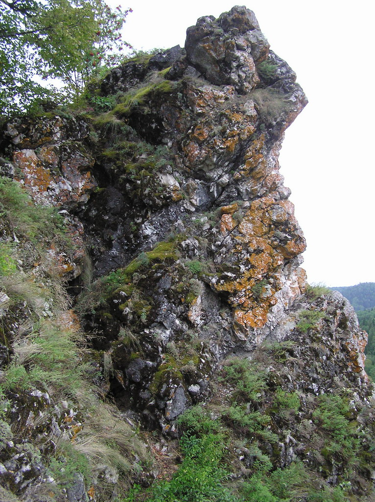 Река Лемеза Скала Мудрец